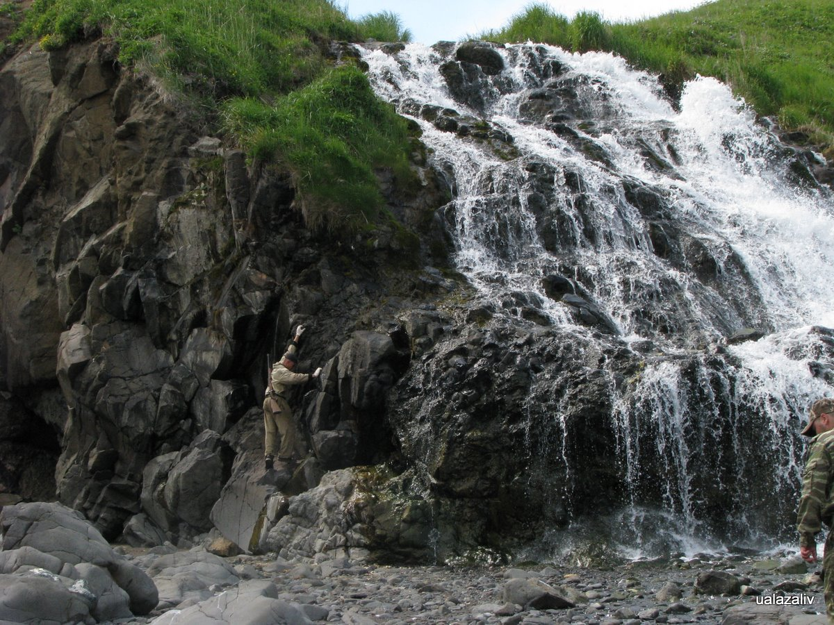 Tigilsky District, Kamchatka Krai, Russia